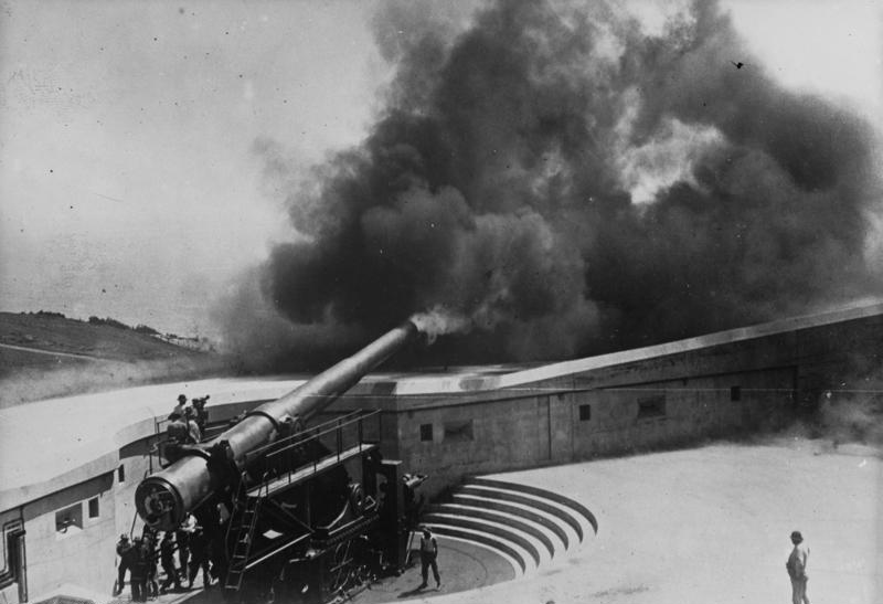 Amerikas grösstes Ferngeschütz feuert ! Blick auf das grösste amerikanische Küstenverteidigungsgeschütz in San Diego beim Abschuss. Die Geschosse haben eine Reichweite von ca. 60 km. Information added by Wikimedia users.This is mis-captioned. The weapon is a 14-inch M1910MI disappearing gun at Fort MacArthur in San Pedro, California in 1924. This information is from Coast Defense Journal, Vol. 31, Issue 2, May 2017, which reproduces the photo as published by International News, Los Angeles Bureau.